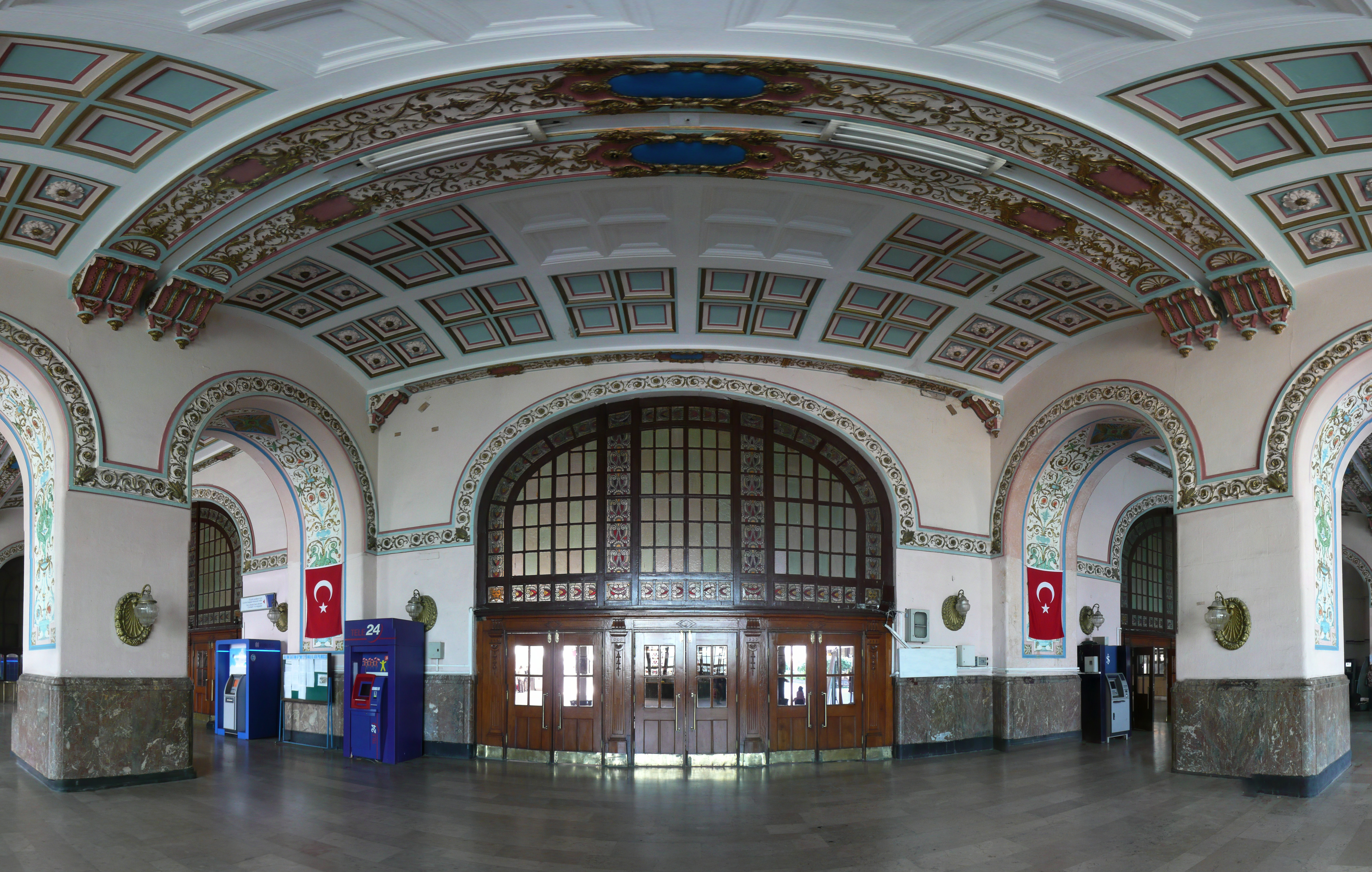 Haydarpaşa terminalı